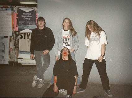 Das erste Bandfoto von Pyogenesis